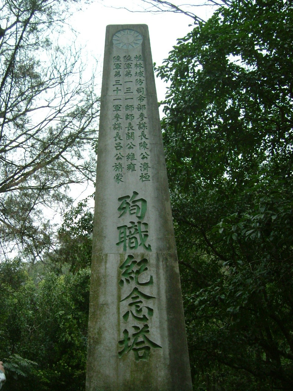 桂柳会战桂林城防指挥官殉职纪念塔。于桂林普陀山